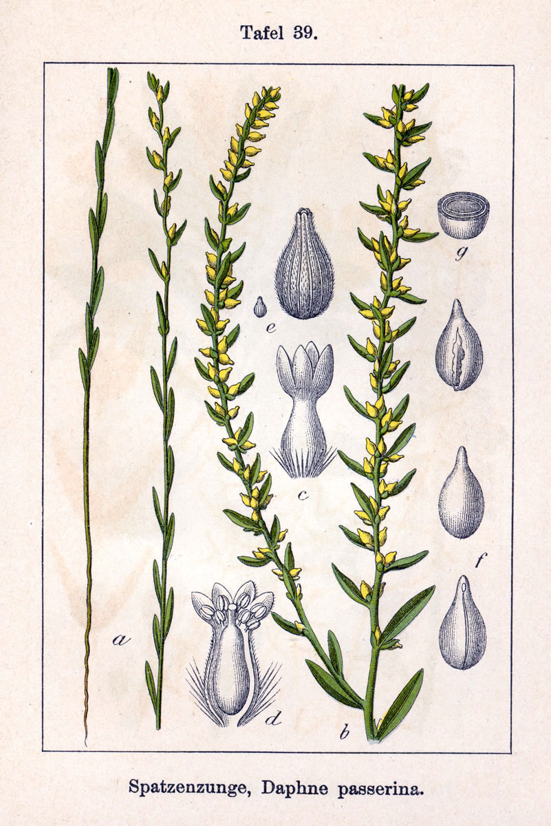 Thymelaea passerina (L.) Coss. & Germ., syn. Daphne passerina E.H.L. Krause Original Description Spatzenzunge, Daphne passerina